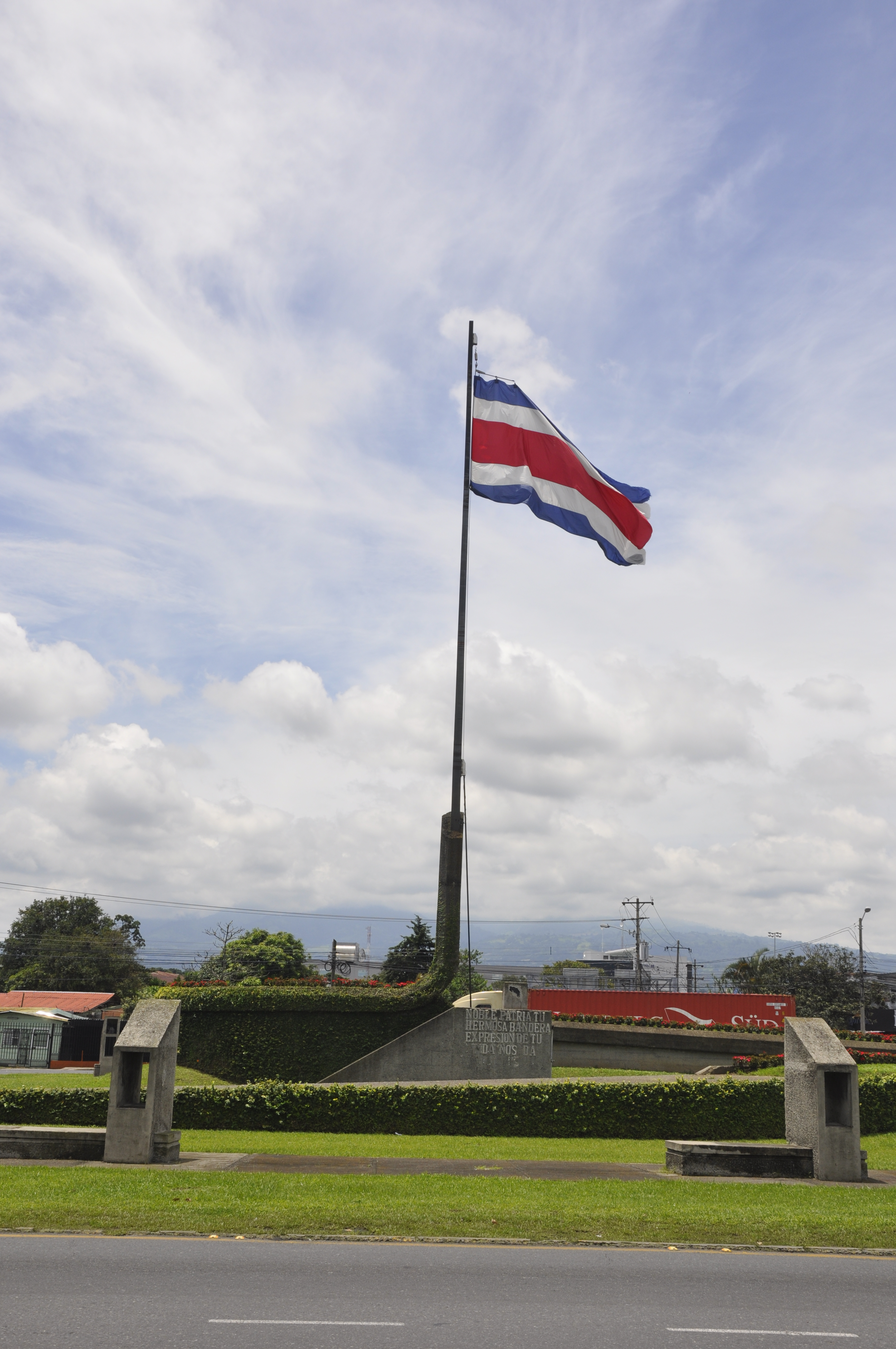 Monumento a la Bandera de Costa Rica, San José, Costa Rica